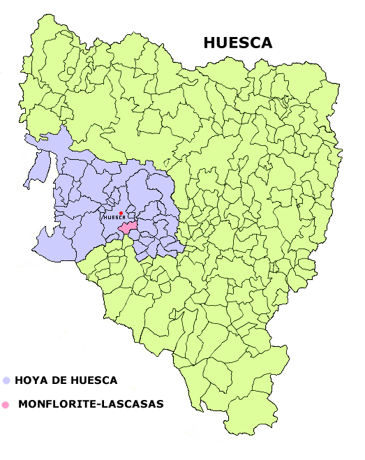 Mapa del municipio de Monflorite-Lascasas Creado el 07.12.2005 por Dionisio en base a Image:Huesca municipalities.png